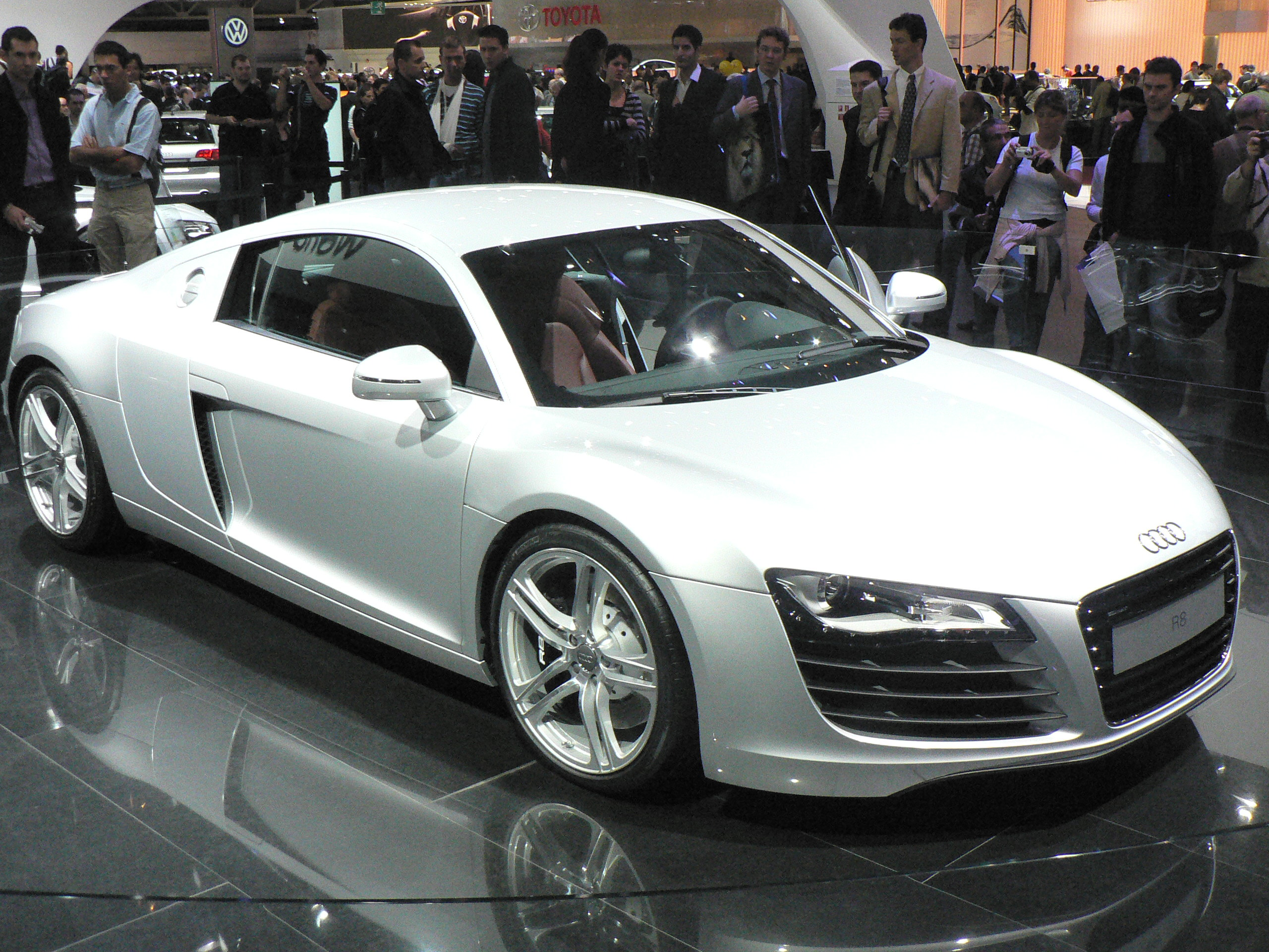 Mondial de l automobile de Paris (October 2006)